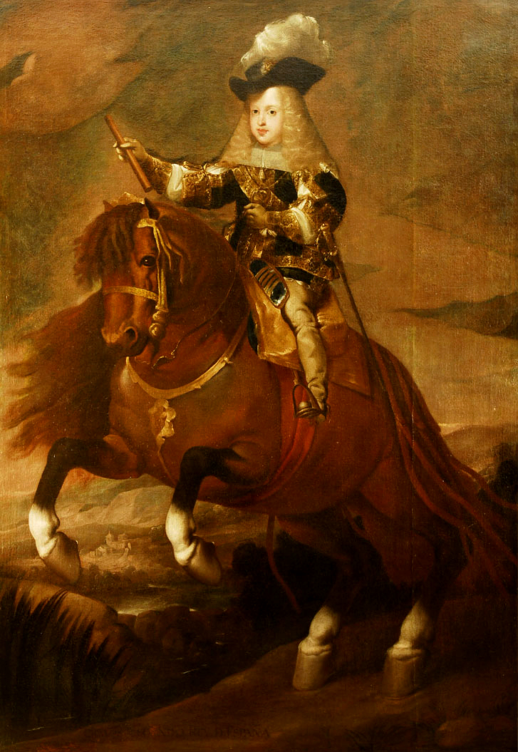 Retrato ecuestre de Carlos_II niño. Óleo sobre lienzo, 207,5 x 146 cm.